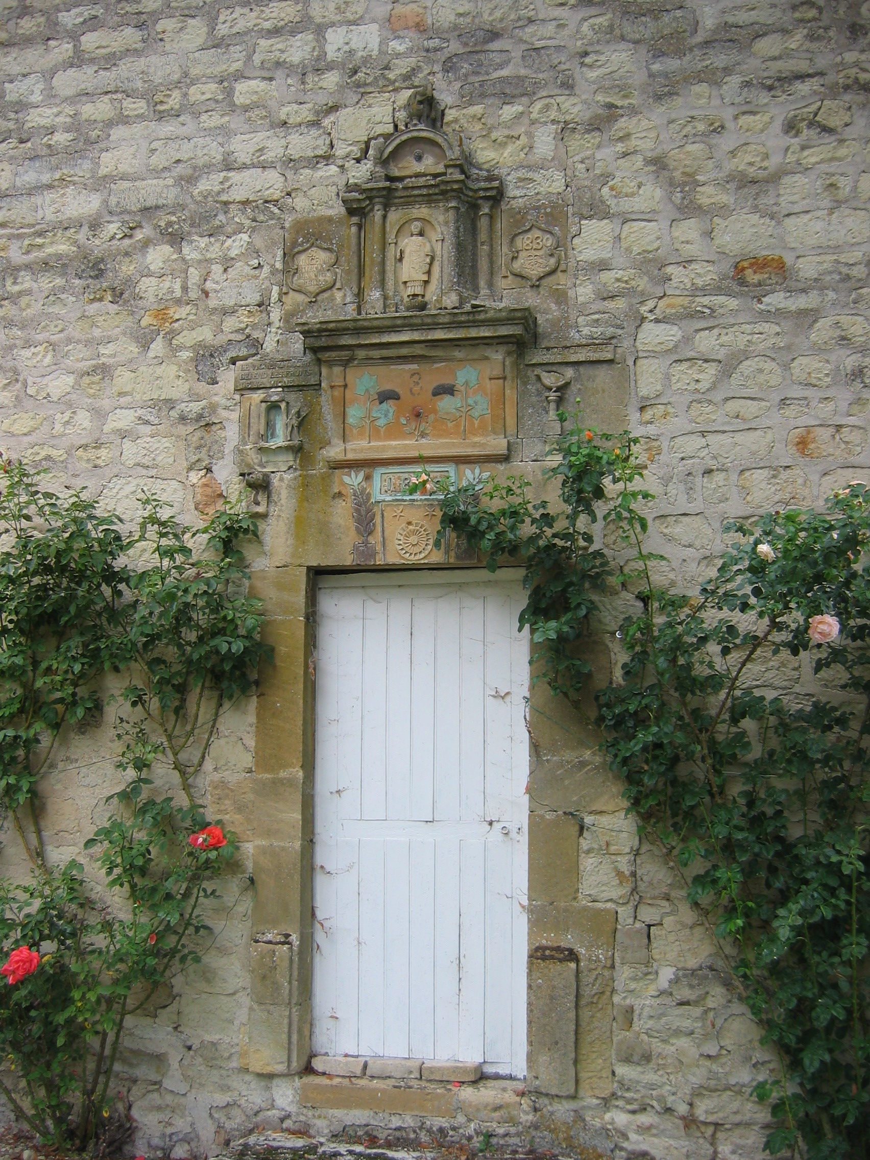 Porte du vigneron au château de Cornay, Ardennes, France